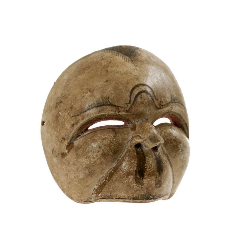 Masker. Semar is de bekendste clownsbediende, panakawan uit de Mahabharata. Hij is een typische Javaanse toevoegin. Hij is een halfgod en de vader van Gareng, Petruk en Bagong. Het is een halfmasker, zodat de danser met dit masker in staat is om te praten. . Houten wajang topèngmasker, voorstellende Semar